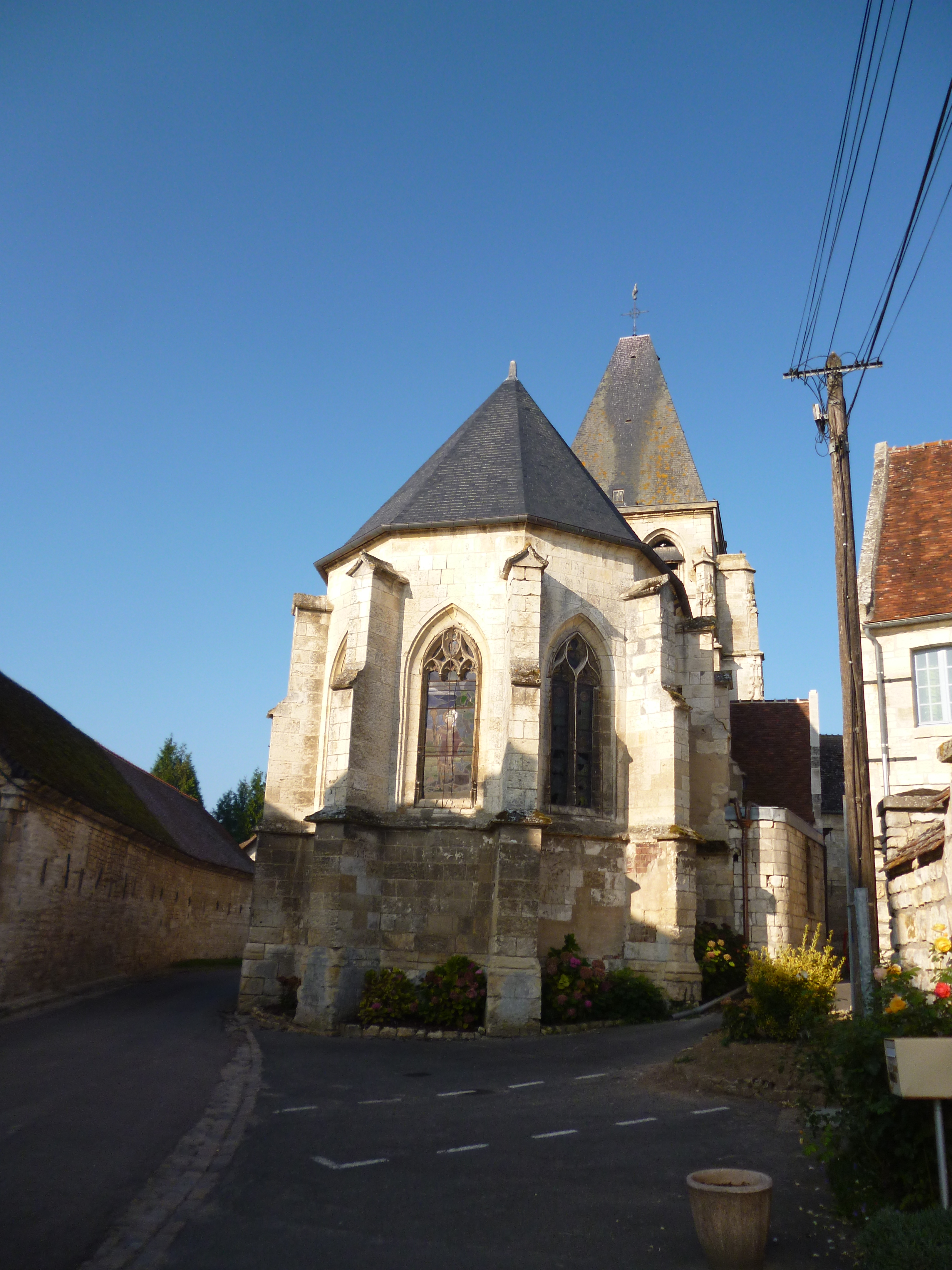 Église Saint-Éloi de Léglantiers (Oise), monument historique .